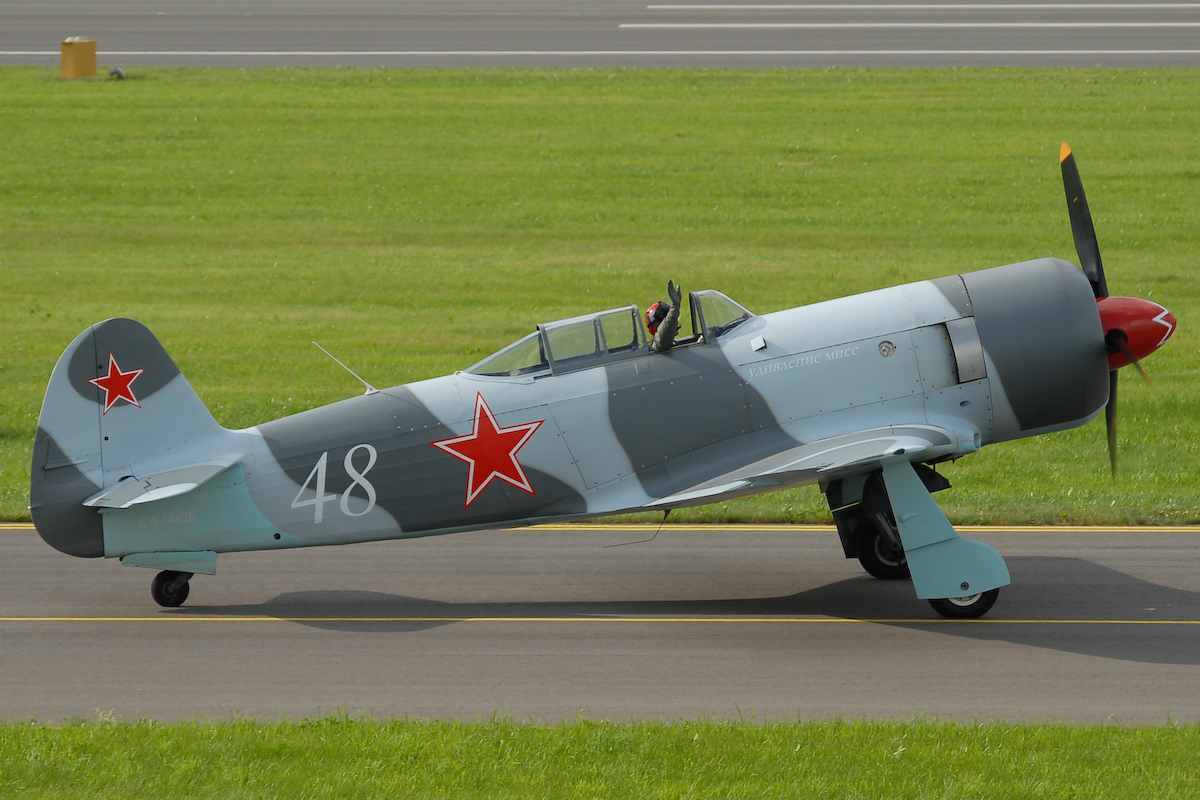 Yak-3U in Zeltweg. "RA-3482K" is a replica of Yak-3UA built in the last few years in Romania by Avione Cariova and has a Pratt & Whitney R-1830 radial engine.